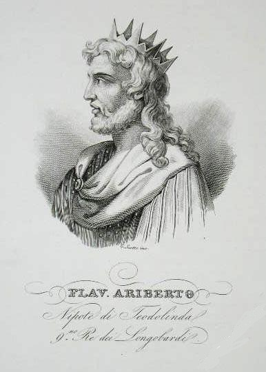 Retrato de Flavio Ariberto o Ariperto, Rey de los Lombardos y de Italia